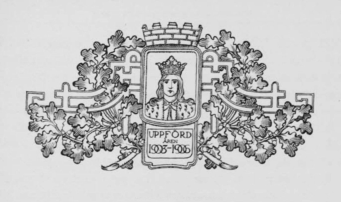 Vinjett S:t Eriksbron 1903-1906